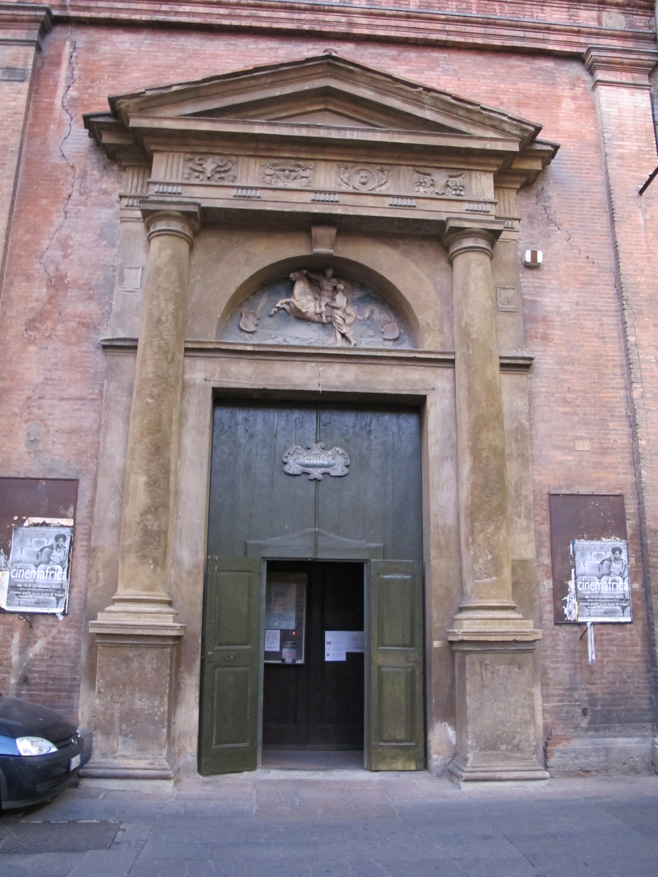 San martino maggiore, bologna, portale laterale con lunetta di Francesco Manzini (1531)